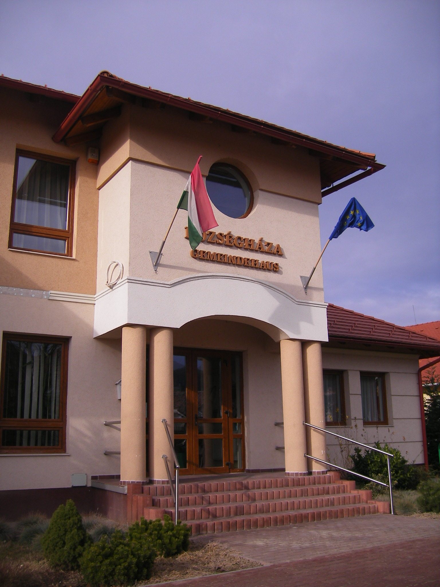 Baj - községháza